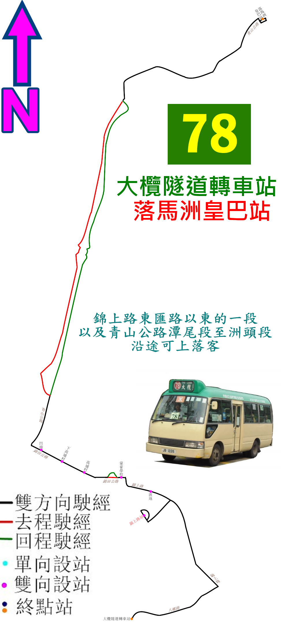 中文（香港）: 新界專線小巴78線的走線圖